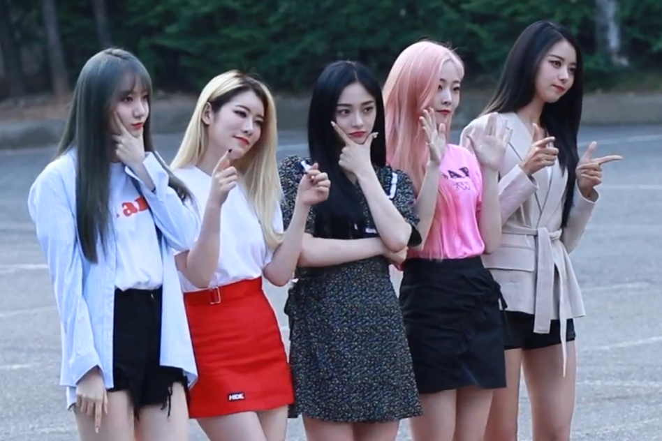 뮤직뱅크 출근길 @180601